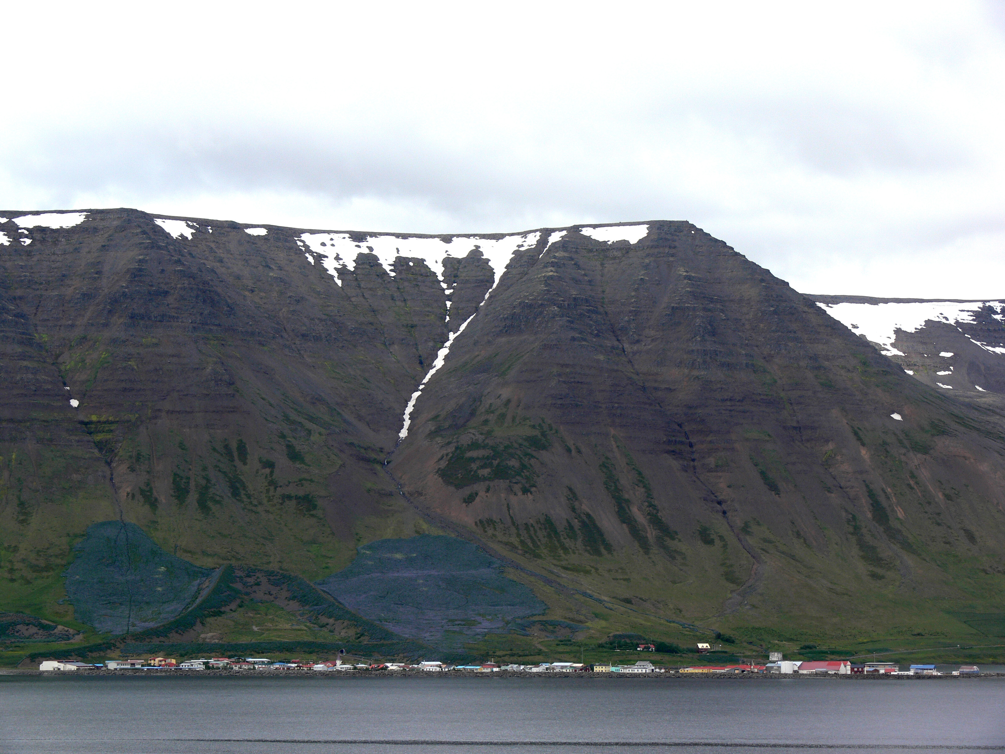 Flateyri von der gegenüberliegenden Fjordseite. Im Hintergrund die neuen Lawinendämme, mit Lupinen bewachsen.